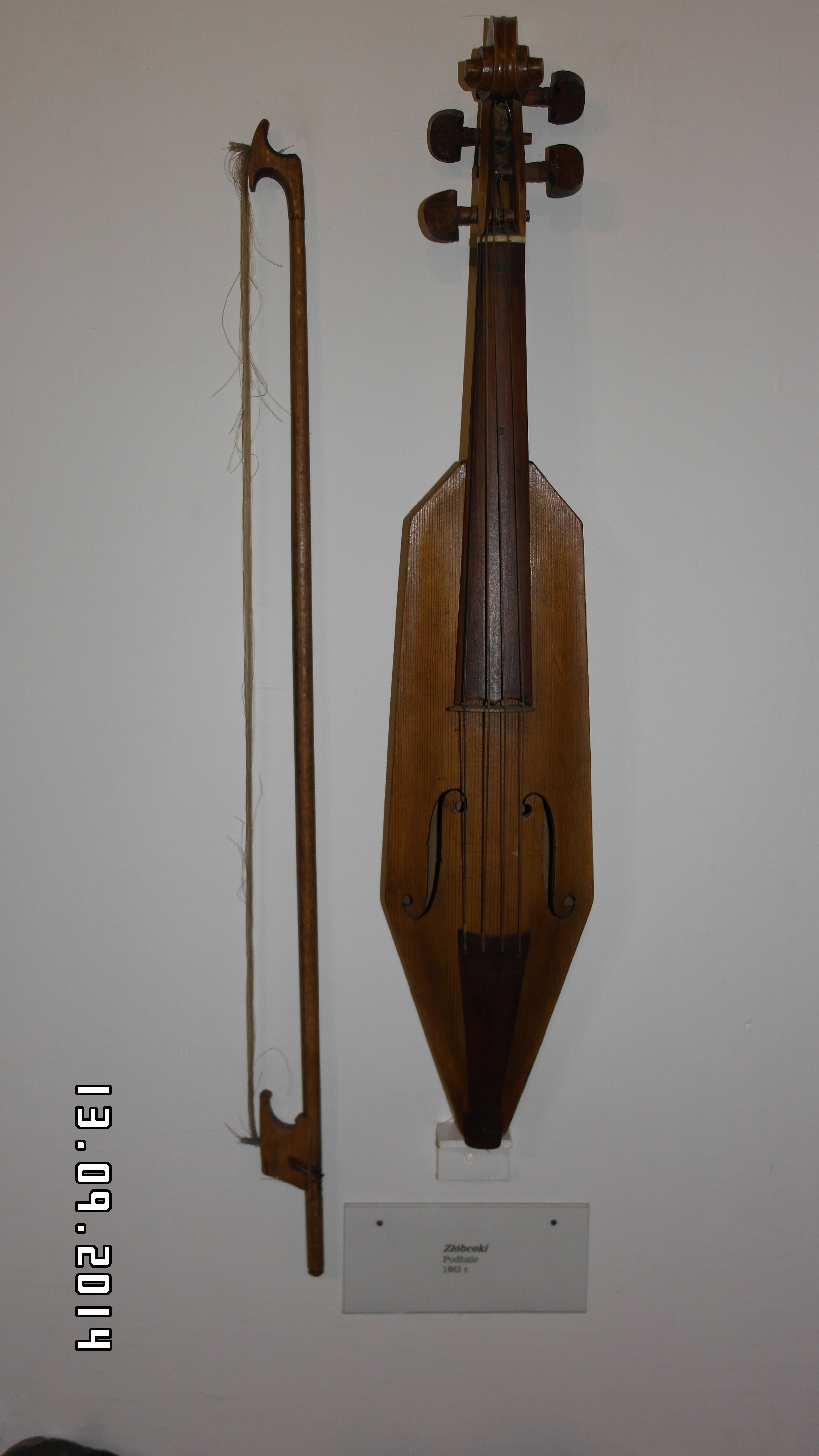 Złóbcoki - instrument górali podhalańskich